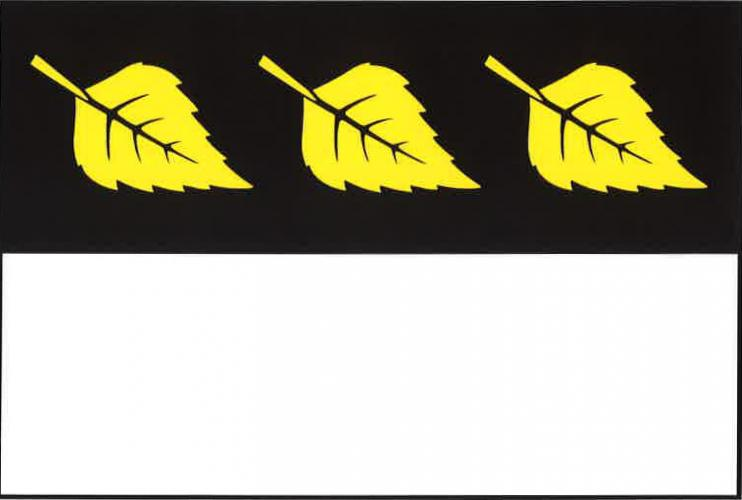 Březí, okres Žďár nad Sázavou, vlajka